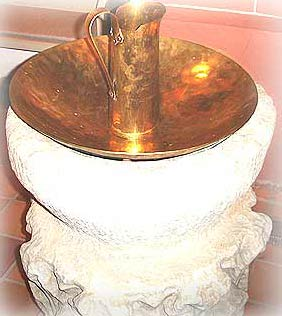 Römisch-korinthischer Taufstein in der Kirche von Langenbach im Taunus